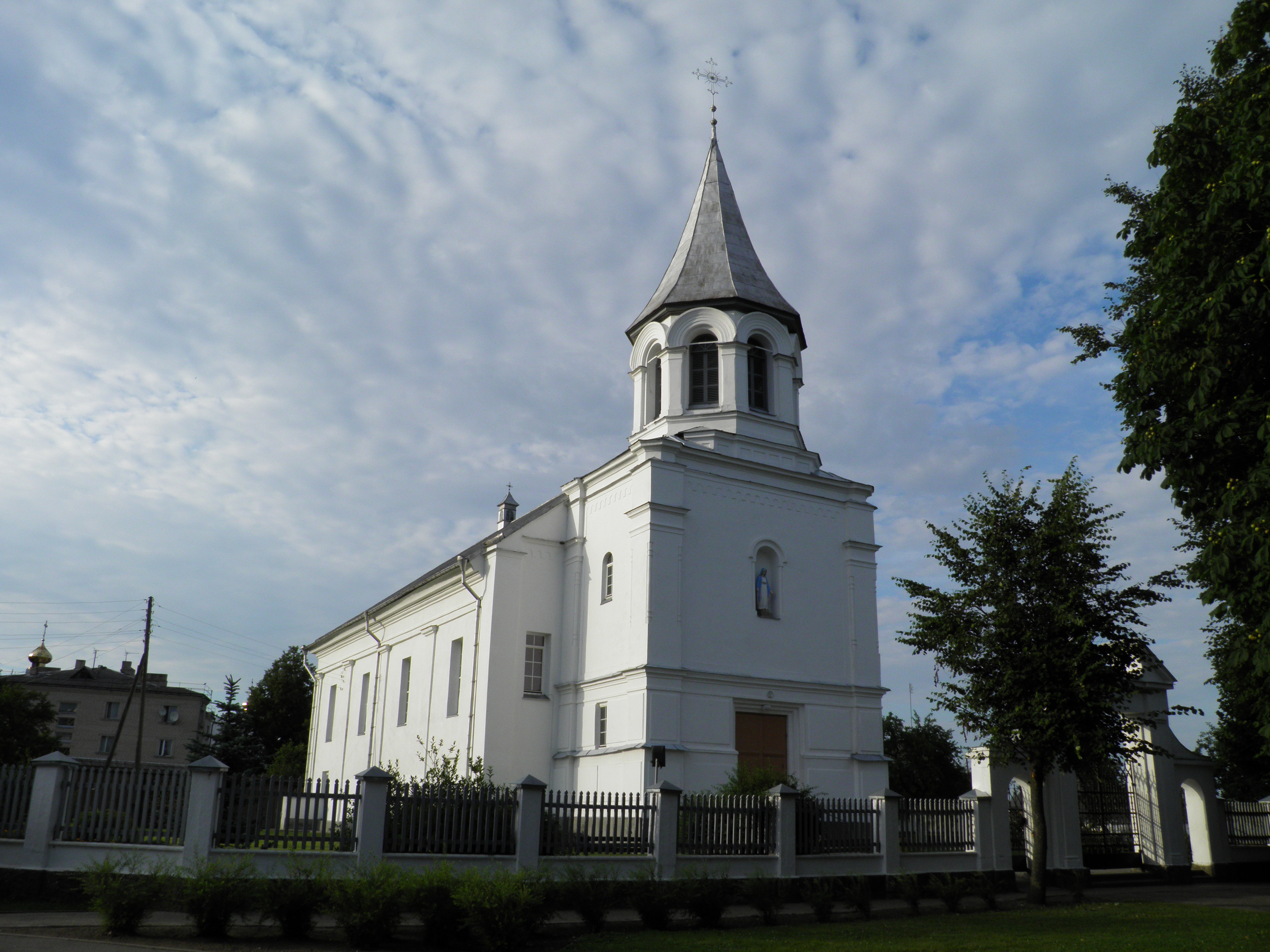 церковь